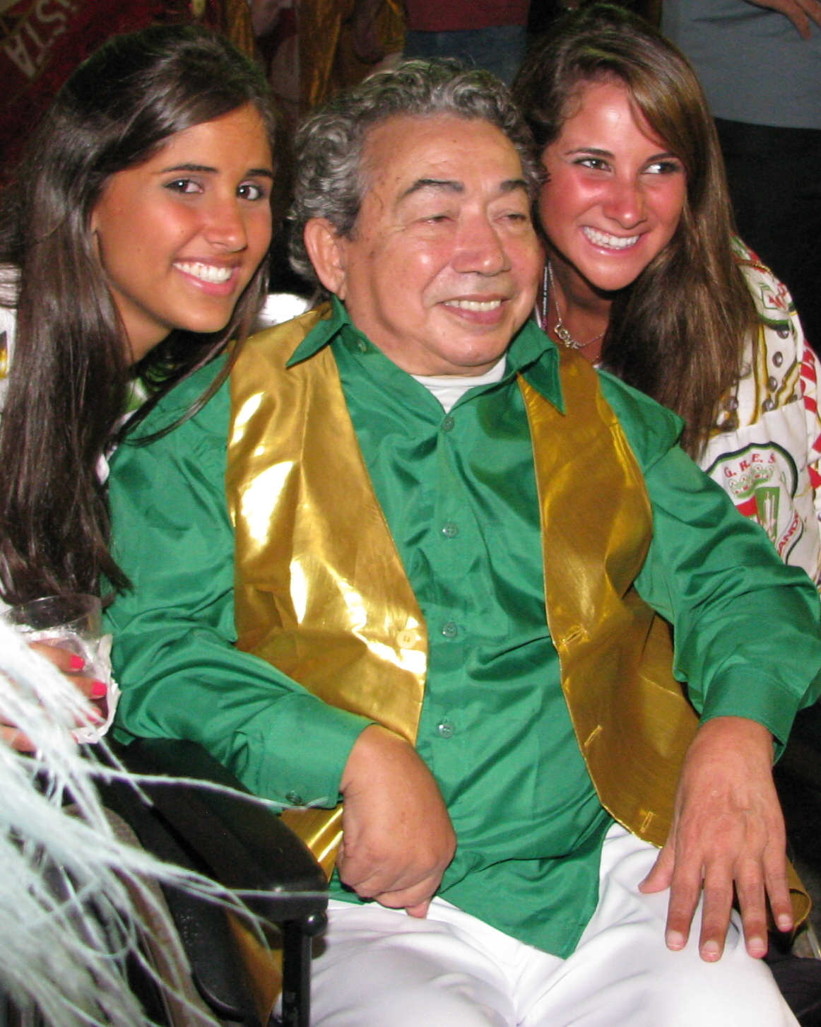 Joãosinho Trinta @ Grand Rio 2010